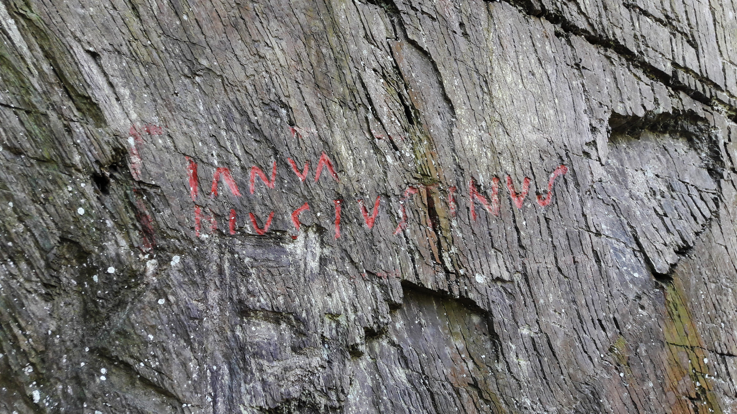 Inschrift am Justinusfelsen